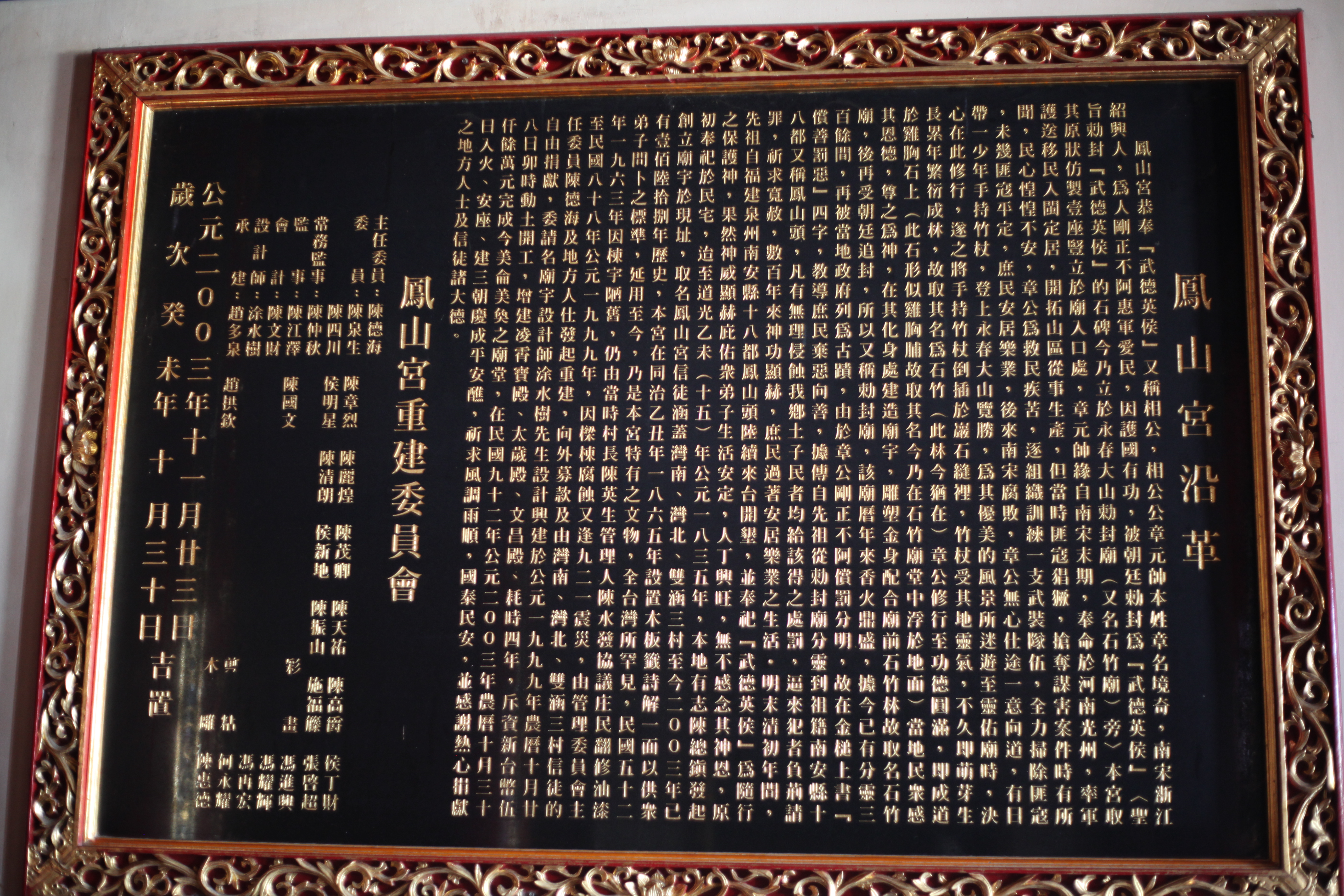 嘉義縣六腳鄉灣北村鳳山宮